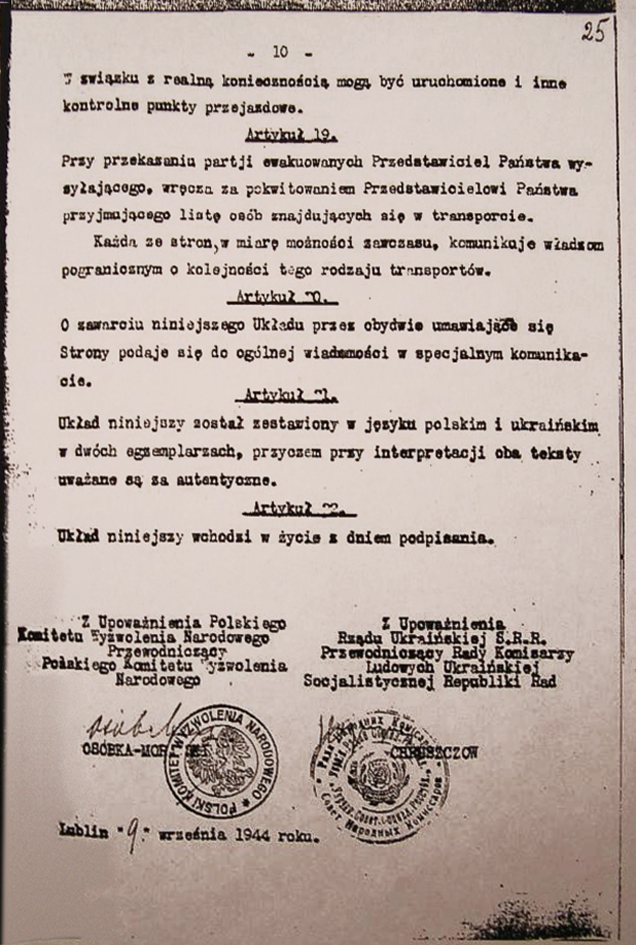 Ostatnia strona Układu polsko-ukraińskiego z 9 września 1944 r. o ewakuacji ludności (tzw. układ republikański) (zdjęcie kserokopii oryginału)